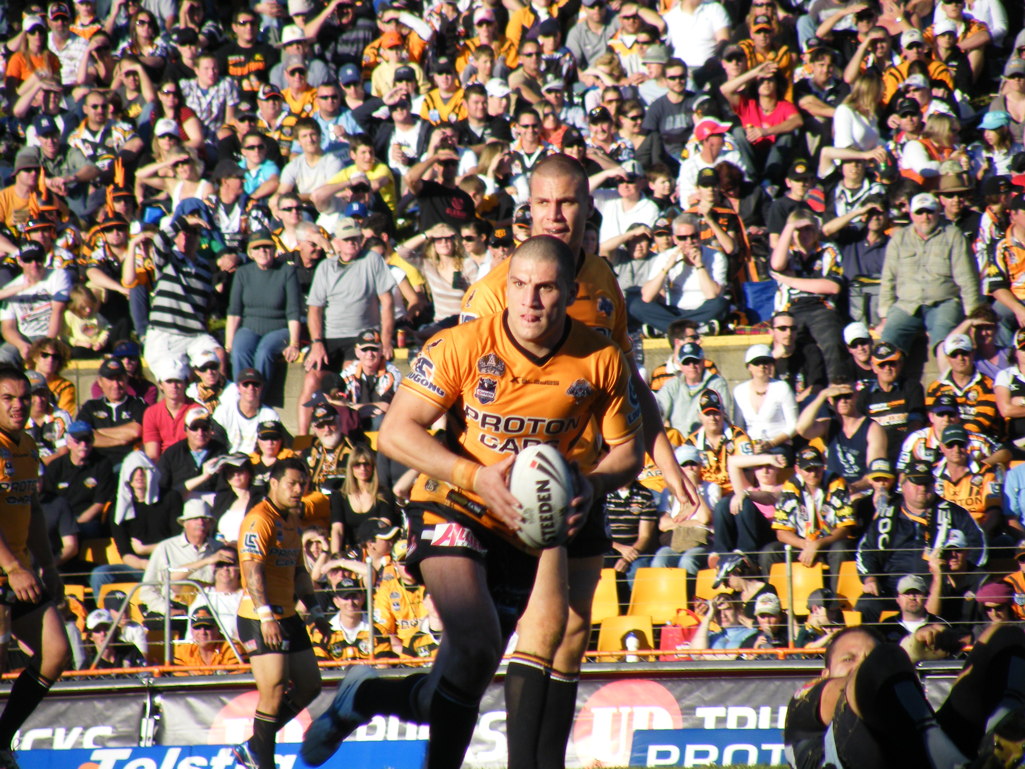 Wests Tiger's Hooker/Half Robbie Farah.